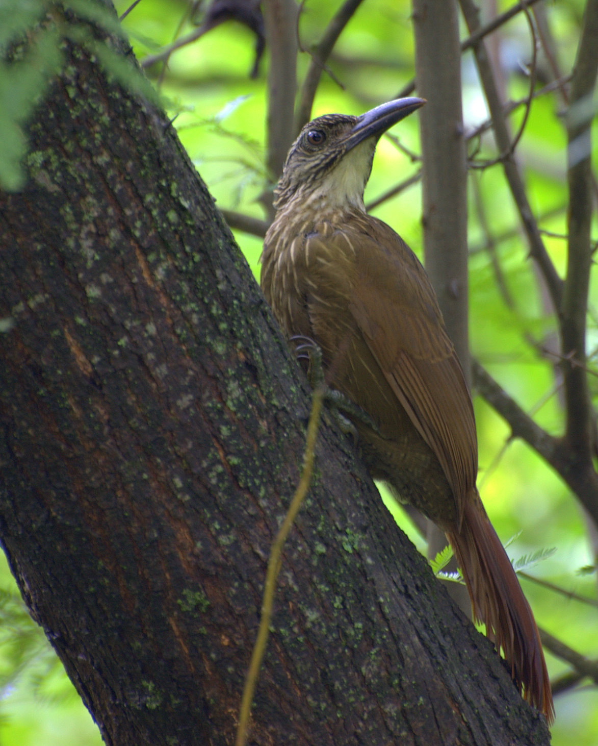 Horto Florestal de São Paulo